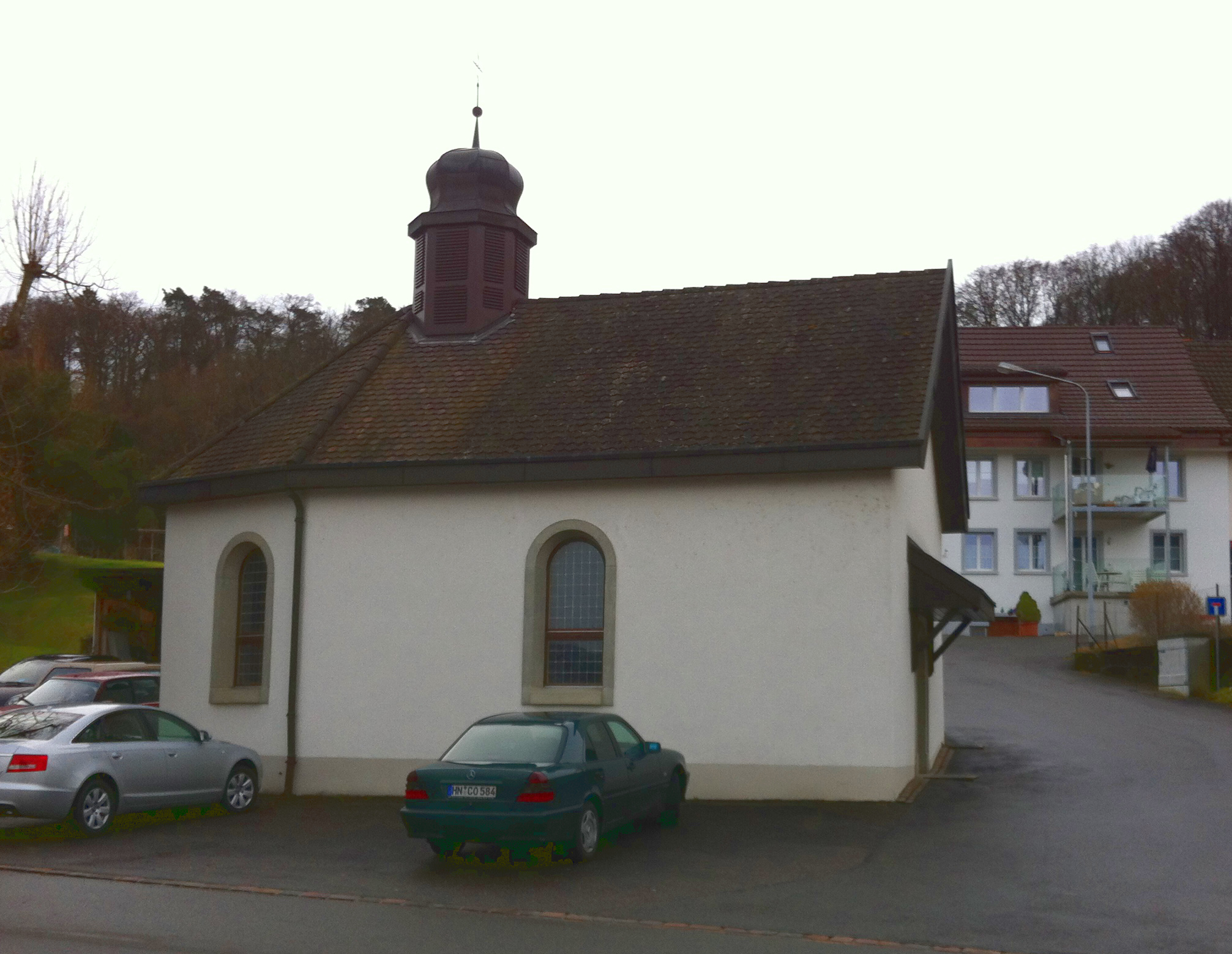 Kapelle in Rümikon, Aargau